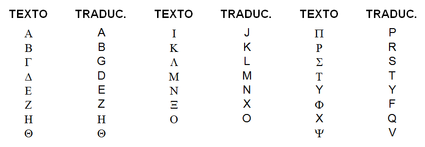 Almagesto Introducción TABLA ALFABETO GRIEGO